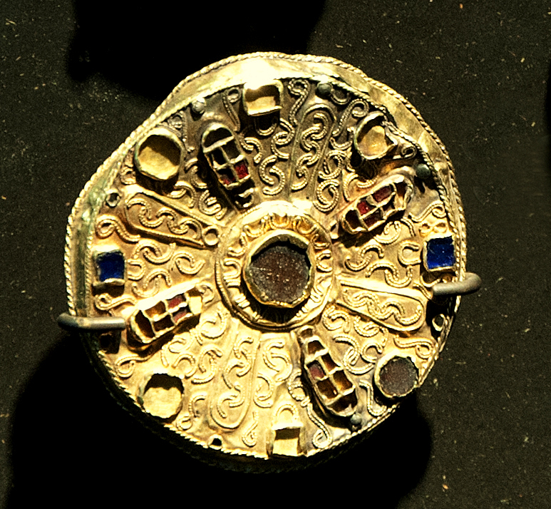 Fibula - mantelspeld - 7e eeuw, gevonden in Moxhe (Hannuit) en bewaard in Grand Curtius, Luik - goud op een bronzen plaat, met ingelegd granaat